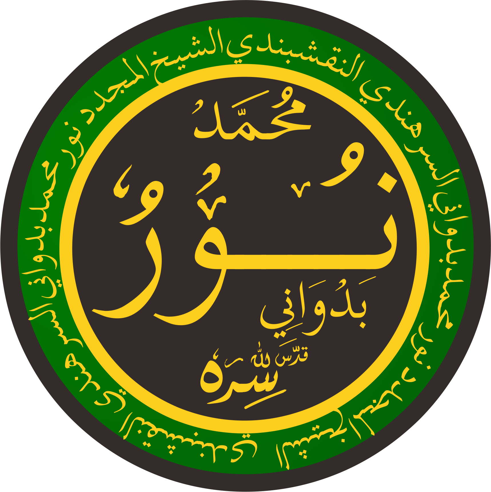 Golden chain Nawsyabandi